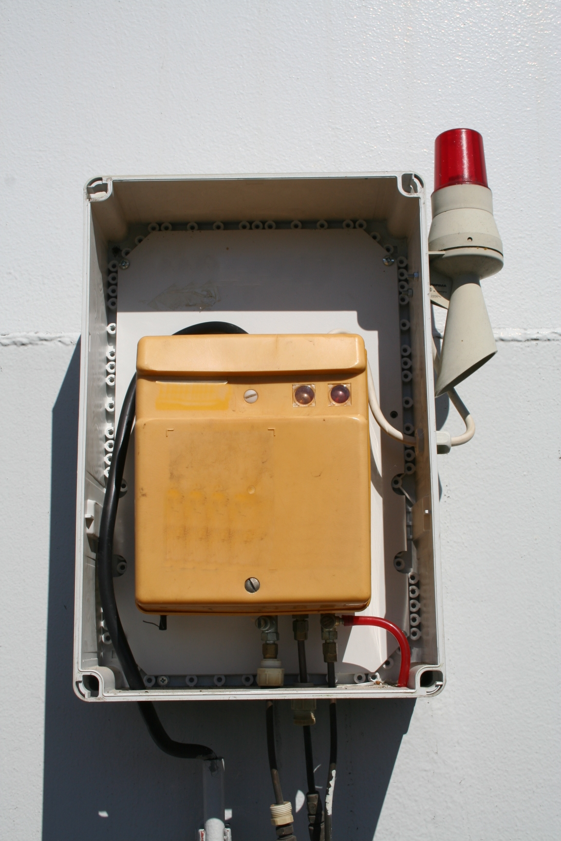 Leckanzeiger an einem Öltank Bitte als Quelle nennen author: btd-tankschutz.de